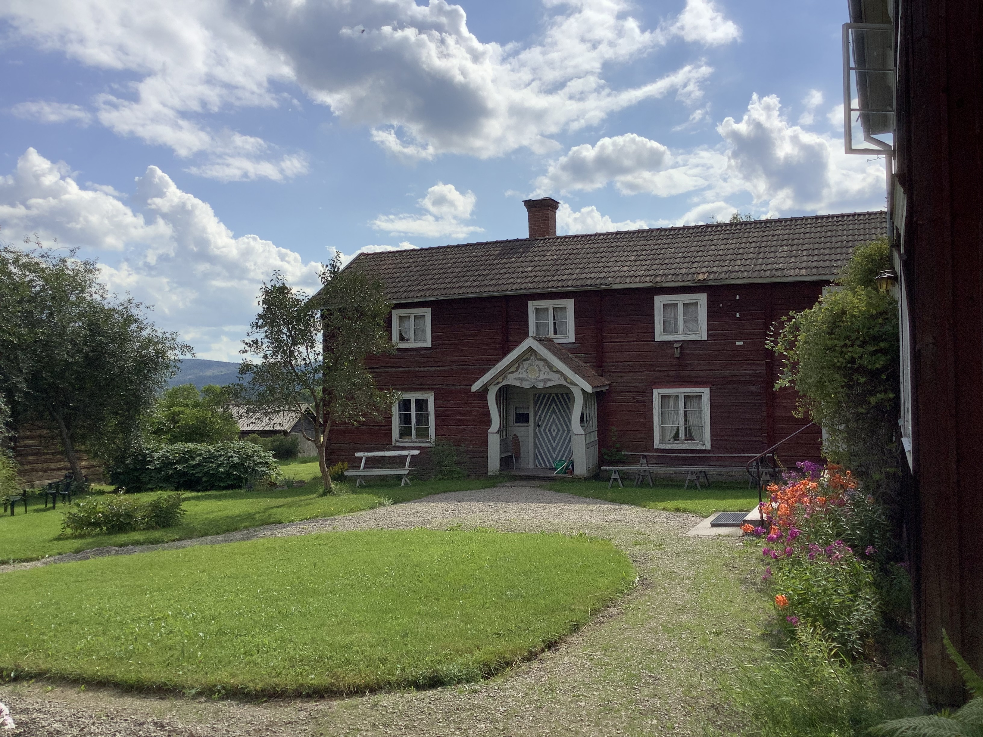 Oljons är en trebyggd hälsingegård i Bondarv 3-4 kilometer söder om Järvsö. Den ligger tätt intill en annan hälsingegård, Karlsgården, också kallad Karls i Bondarv, vars byggnader är omålade, till skillnad från byggnaderna tillhörande Oljons.